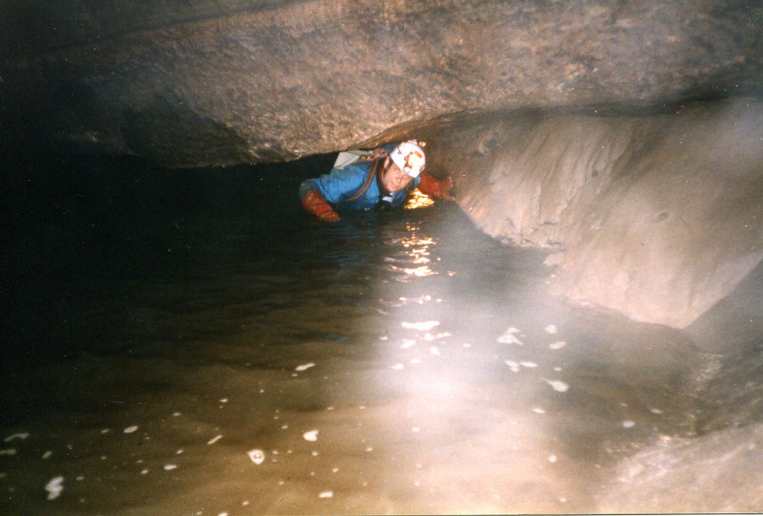 Un spéléologue franchissant la vasque du passage de Noël au gouffre des Vitarelles.